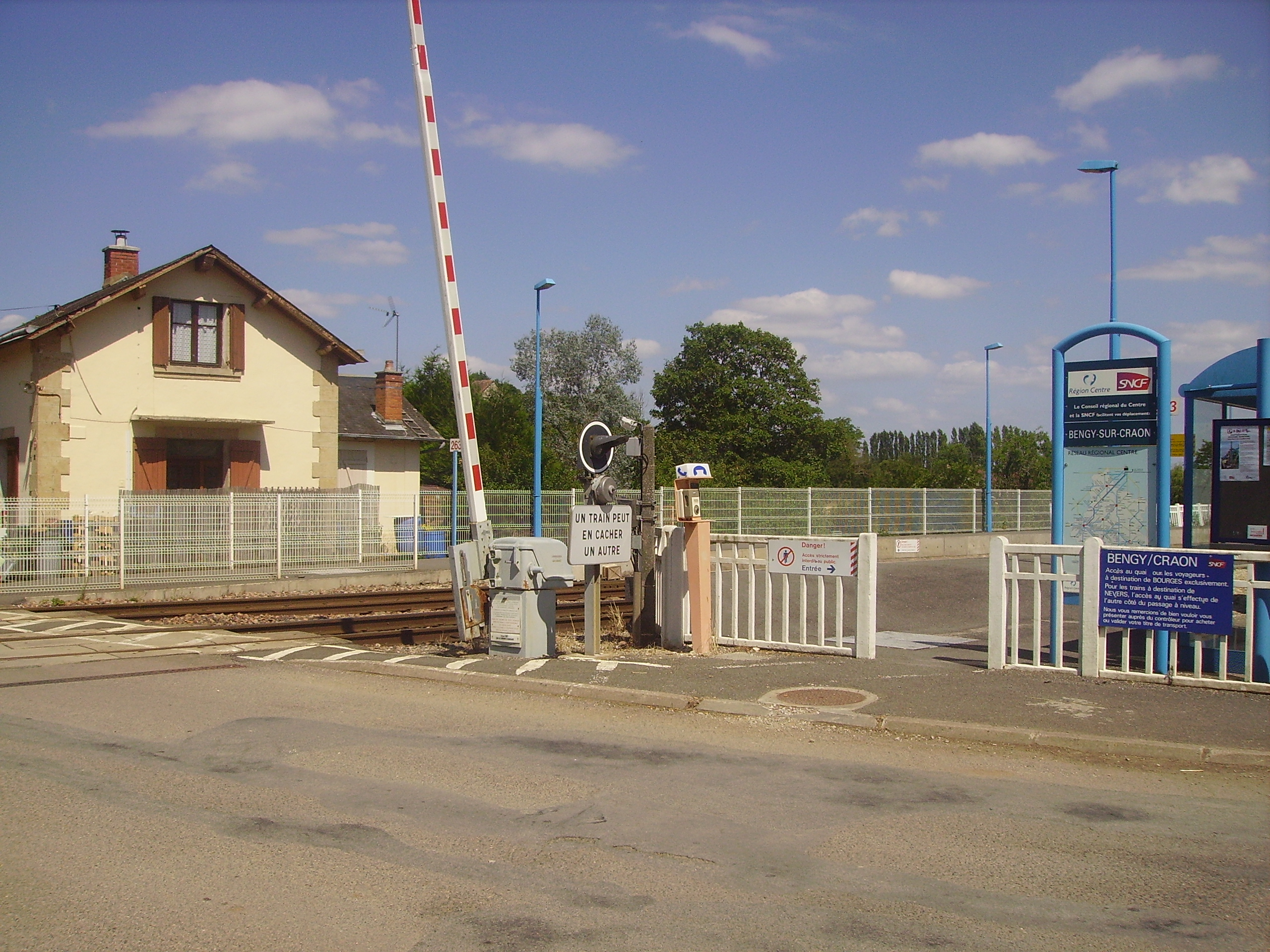 Gare de Bengy-sur-Craon